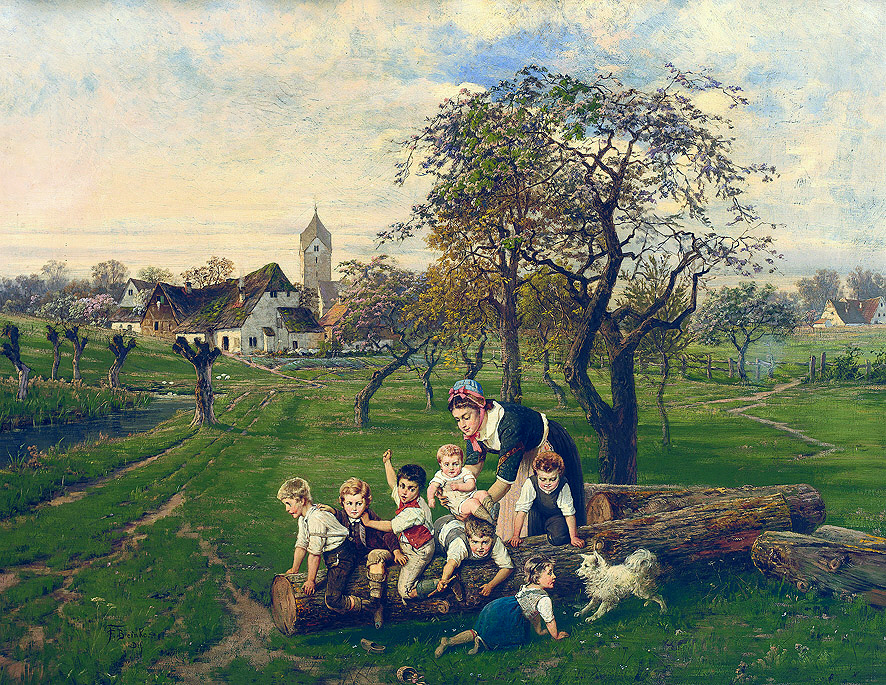 Fritz Beinke: Frühlingstag auf dem Land; Öl auf Leinwand; 65 x 84 cm